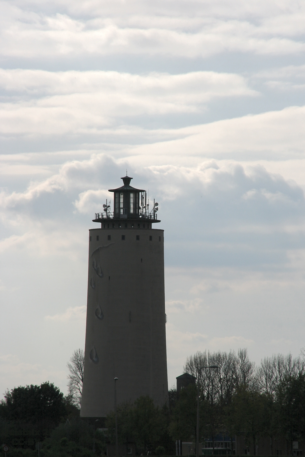 Oostburg: Watertoren (bouwjaar 1950)